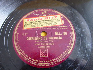 Disco Colúmbia de 75 rot.Corridinho de Portimão